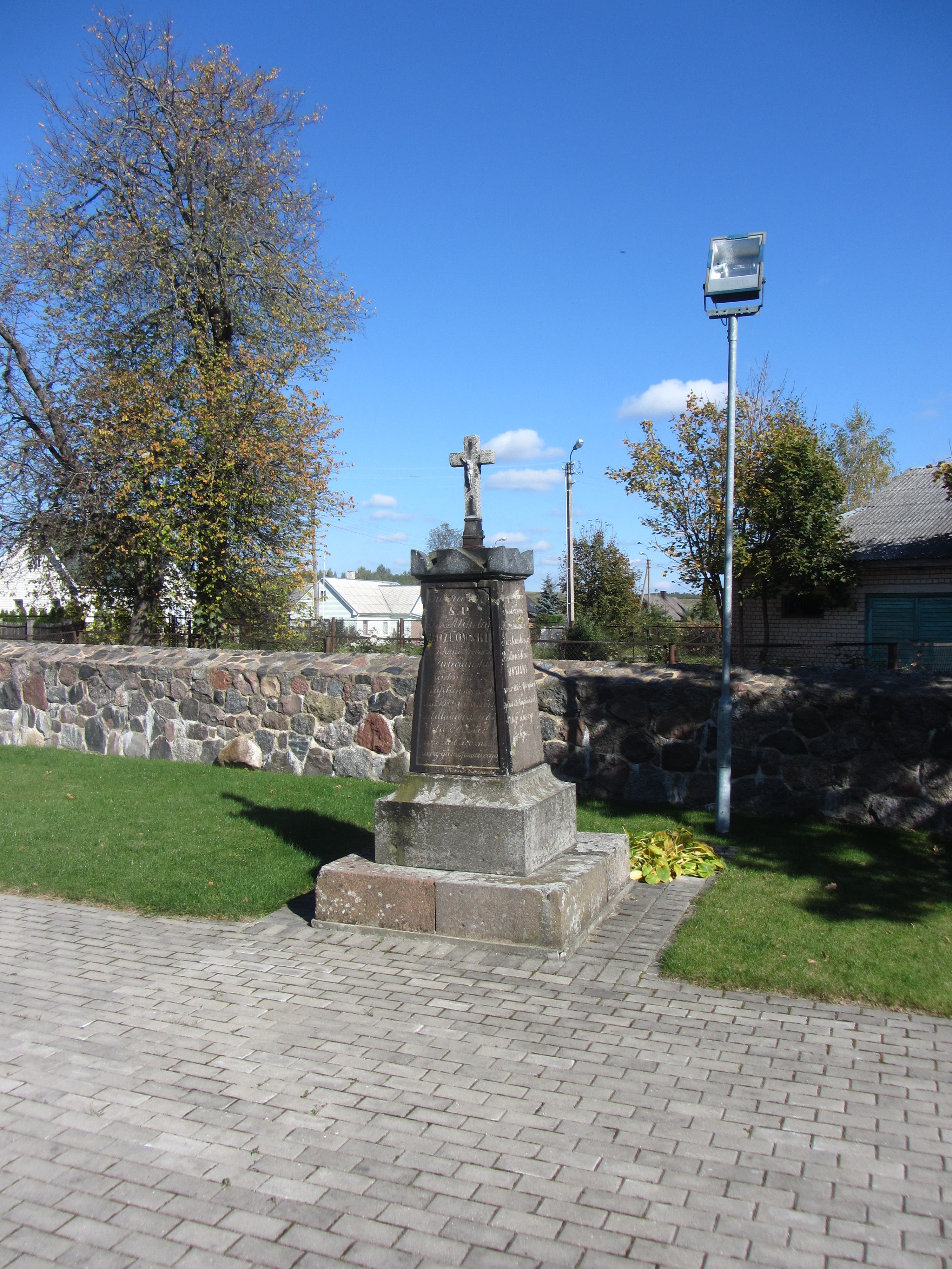 Švenčionys, Lithuania